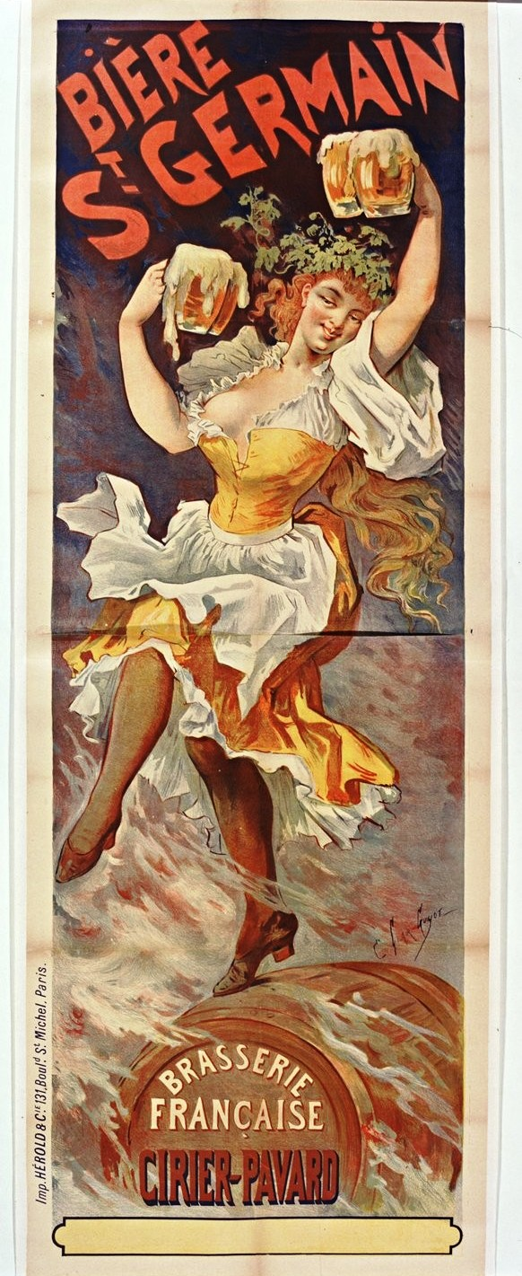 Affiche publicitaire de la brasserie Cirier-Pavard à Saint-Germain-en-Laye.